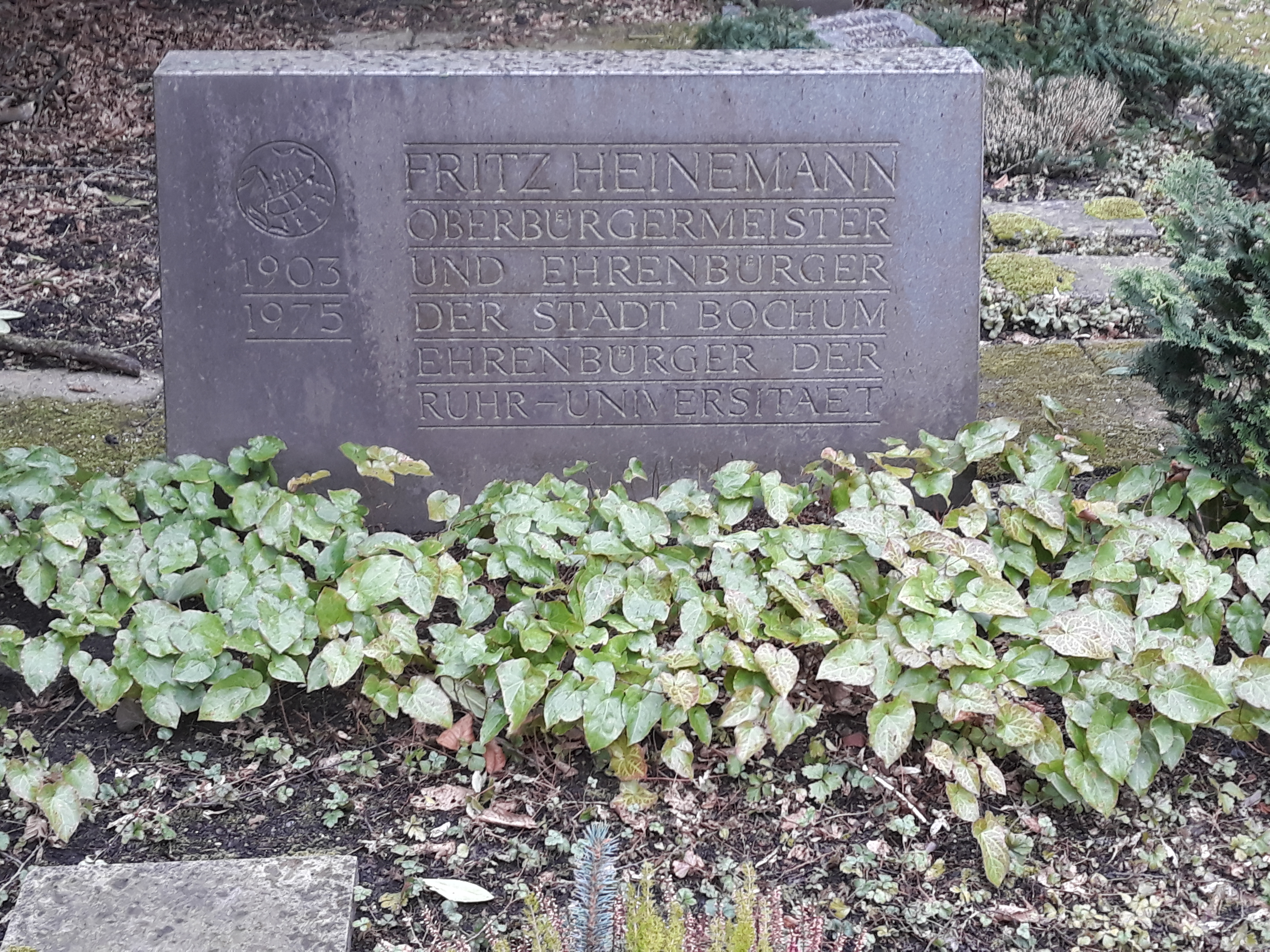 Das Grab des deutschen Politikers und Bochumer Oberbürgermeisters Fritz Heinemann (SPD) auf dem Friedhof Querenburg in Bochum.